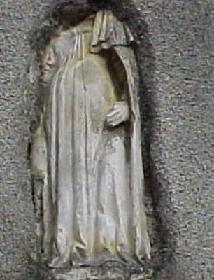 Vierge enceinte à Grignoncourt.